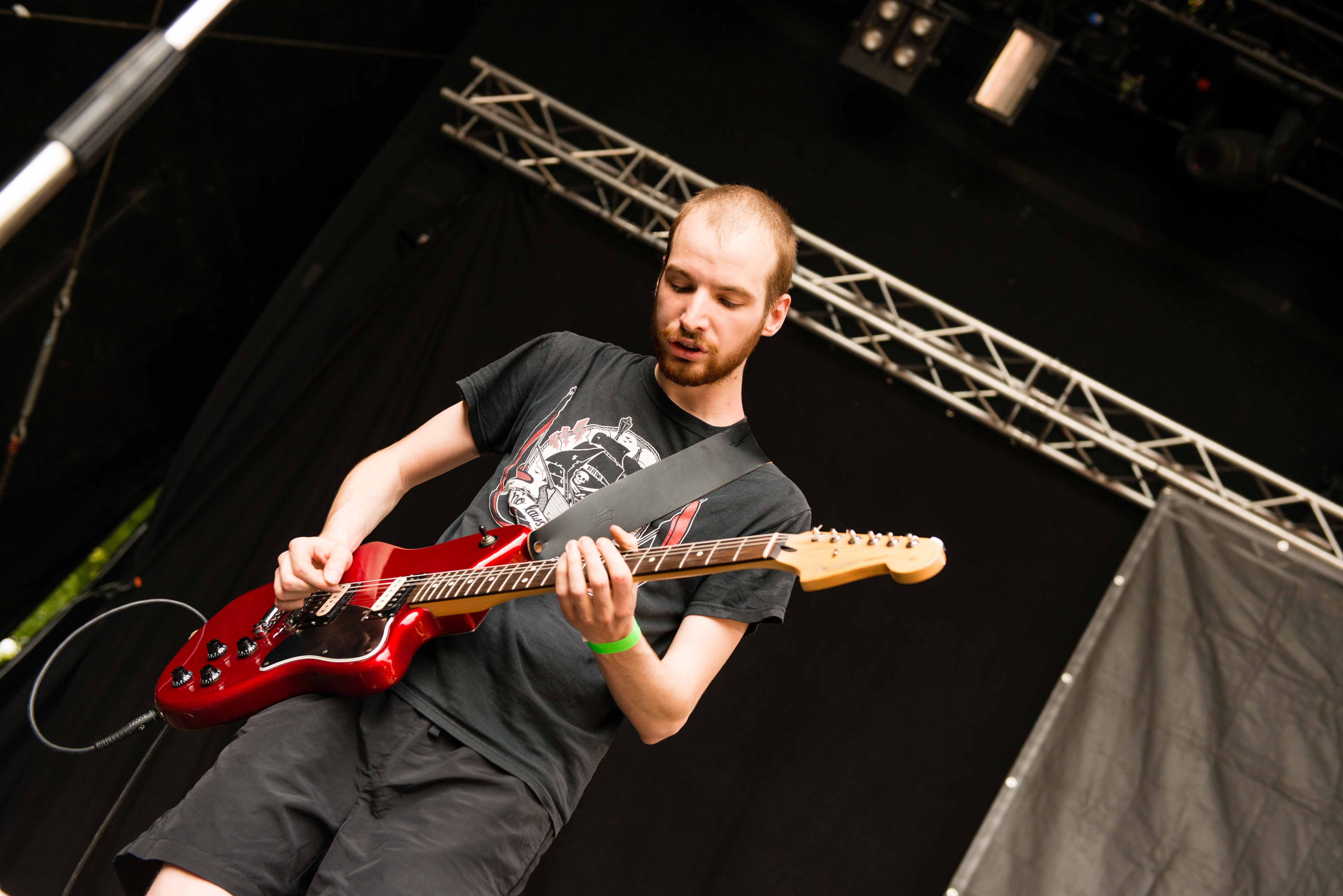 '32. Pfingst Open Air 2014 - Essen Werden': 'Feine Sahne Fischfilet'